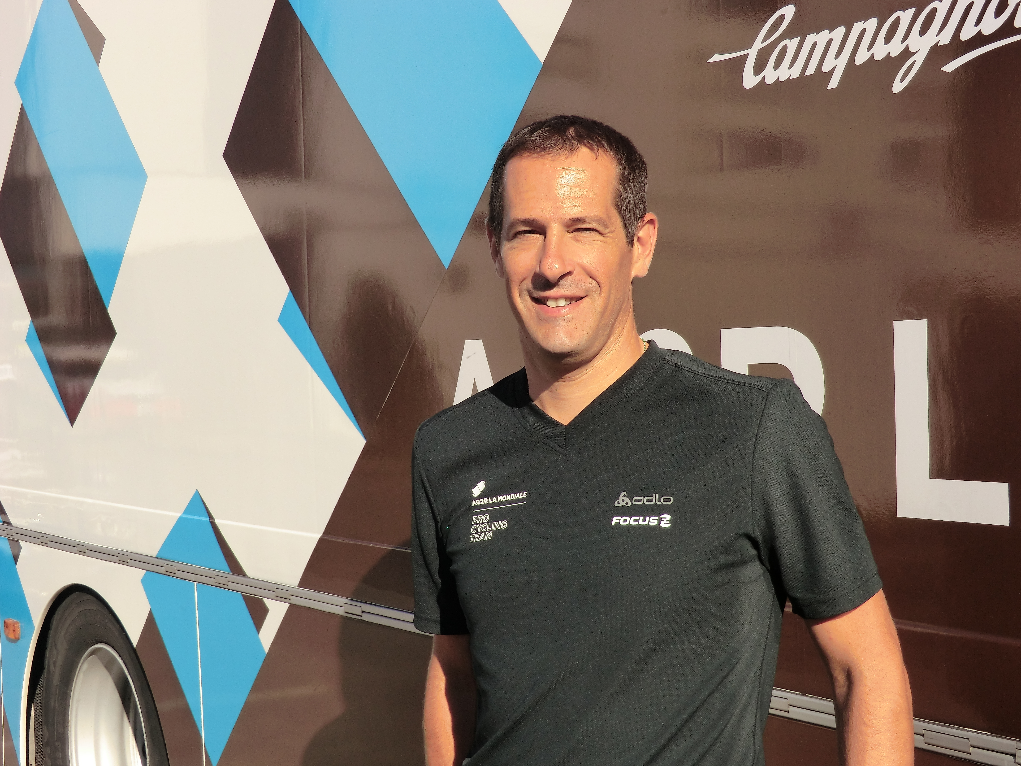 Julien Jurdie au soir de la seconde étape du Tour de l'Ain 2013, au soir de la seconde étape à l'hôtel Lyon-Est de Saint-Maurice-de-Beynost.